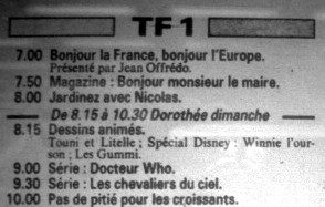 Photographie du programme télévisé de TF1, le 19 février 1989 de 7 à 10 heures du matin.